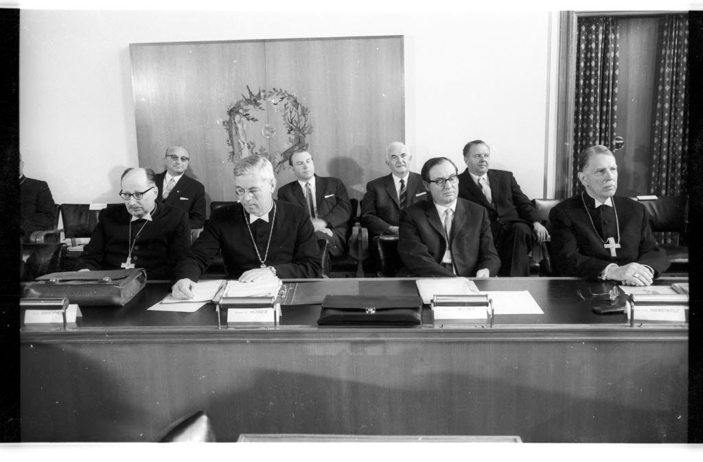 Eröffnung der ersten Arbeitssitzung im Ratssaal im Rathaus. Im Bild am Tisch Oberlandeskirchenrat von Braunschweig Rudolf Brinckmeier (1.v.l.), Landesbischof von Holstein Friedrich Hübner (2.v.l.), Bischof von Hamburg Hans-Otto Wölber (3.v.l.) und der Abt des Klosters Amelungsborn Pfarrer Christhard Mahrenholz (4.v.l.).